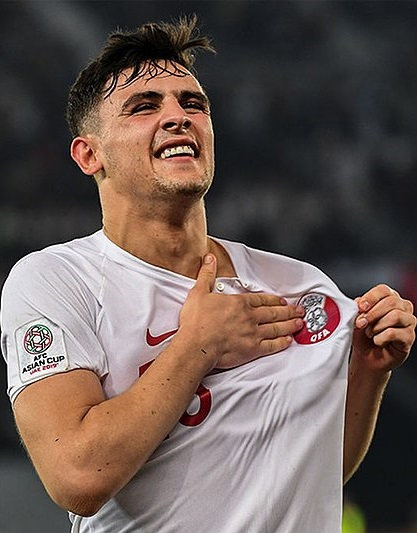 فینال جام ملت های آسیا ۲۰۱۹ - دیدار قطر و ژاپن دیدار تیم های ملی فوتبال قطر و ژاپن در مرحله نهایی هفدهمین دوره جام ملت های آسیا ۲۰۱۹ امارات ، با برتری ۳ بر یک قطر در ورزشگاه بن زاید شهر ابوظبی بر